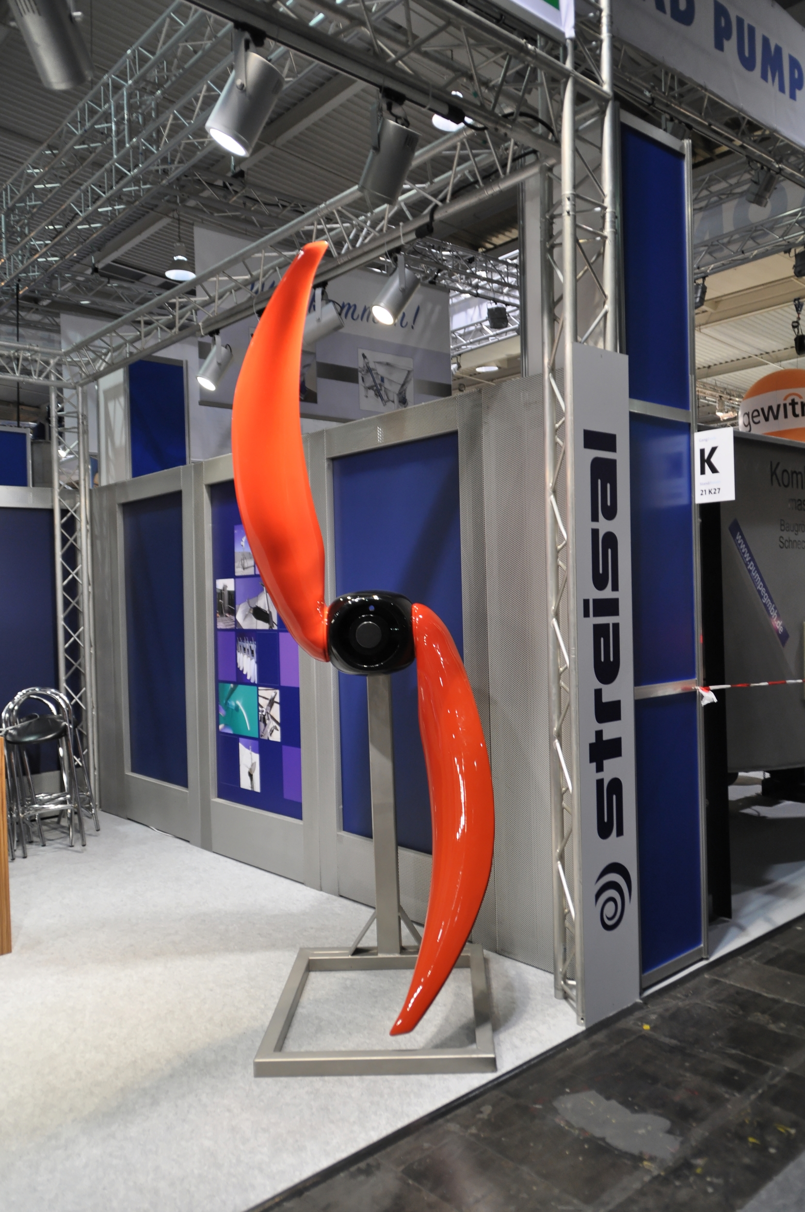 Bilder von der Agritechnica 2011 Dieses Foto entstand durch die Mithilfe der Wikimedia Deutschland e. V. bei der Akkreditierung als Fotograf. Wikimedia Deutschland e. V. hilft den Freiwilligen der Wikipedia bei der Erstellung von freien Inhalten.